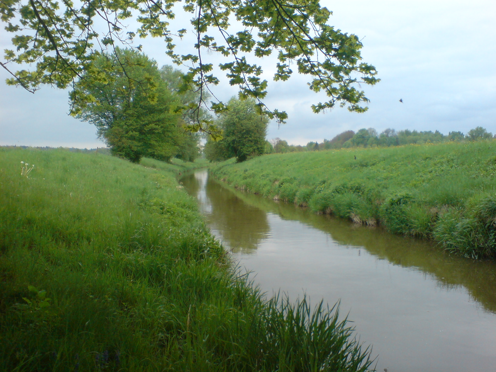 Die junge, stark begradigte Jagst oberhalb der Stadt Ellwangen. Rauchschwalben.